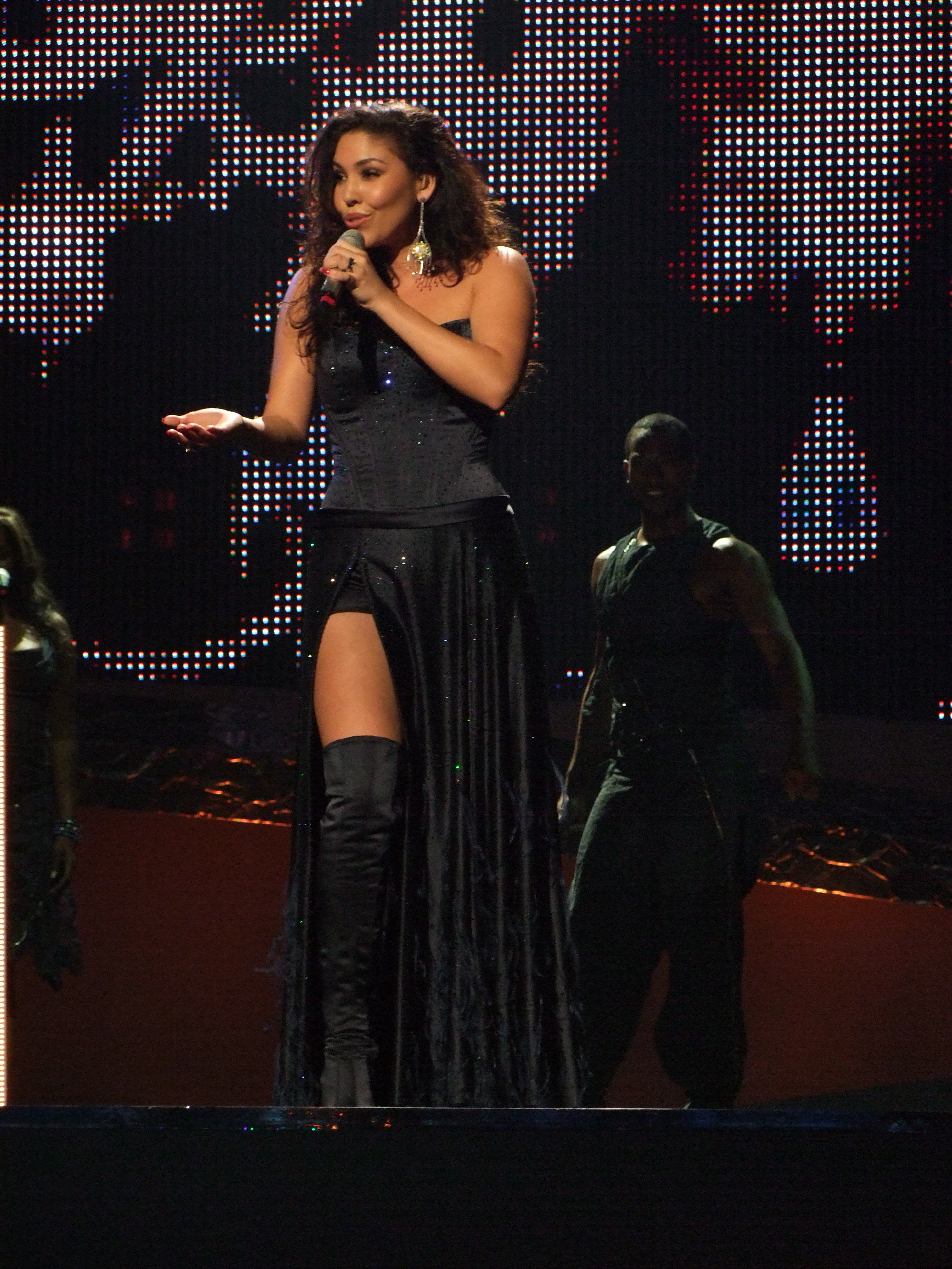 Semifinal 1 EUROVISION 2008